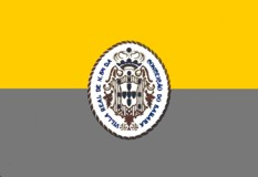 bandeira da cidade de Sabará.